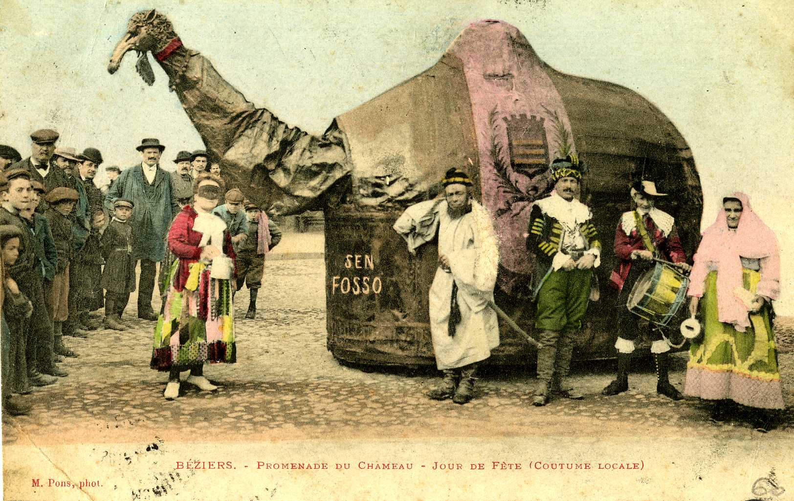 Carte postale de l'animal totémique de la ville de Béziers, sortie lors des fêtes avec cortège